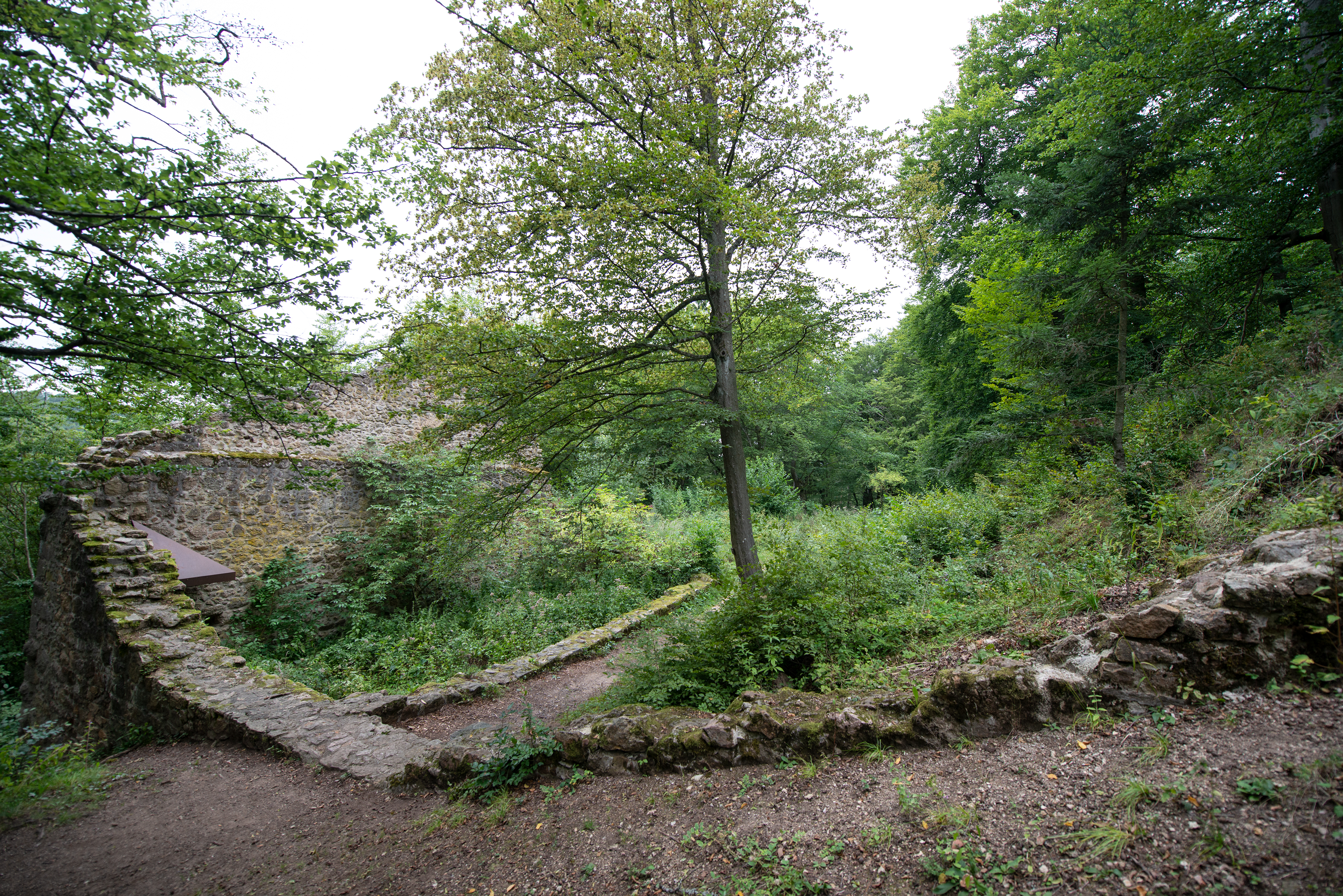 Vorburg der Burgruine Stockenfels mit Mauerresten